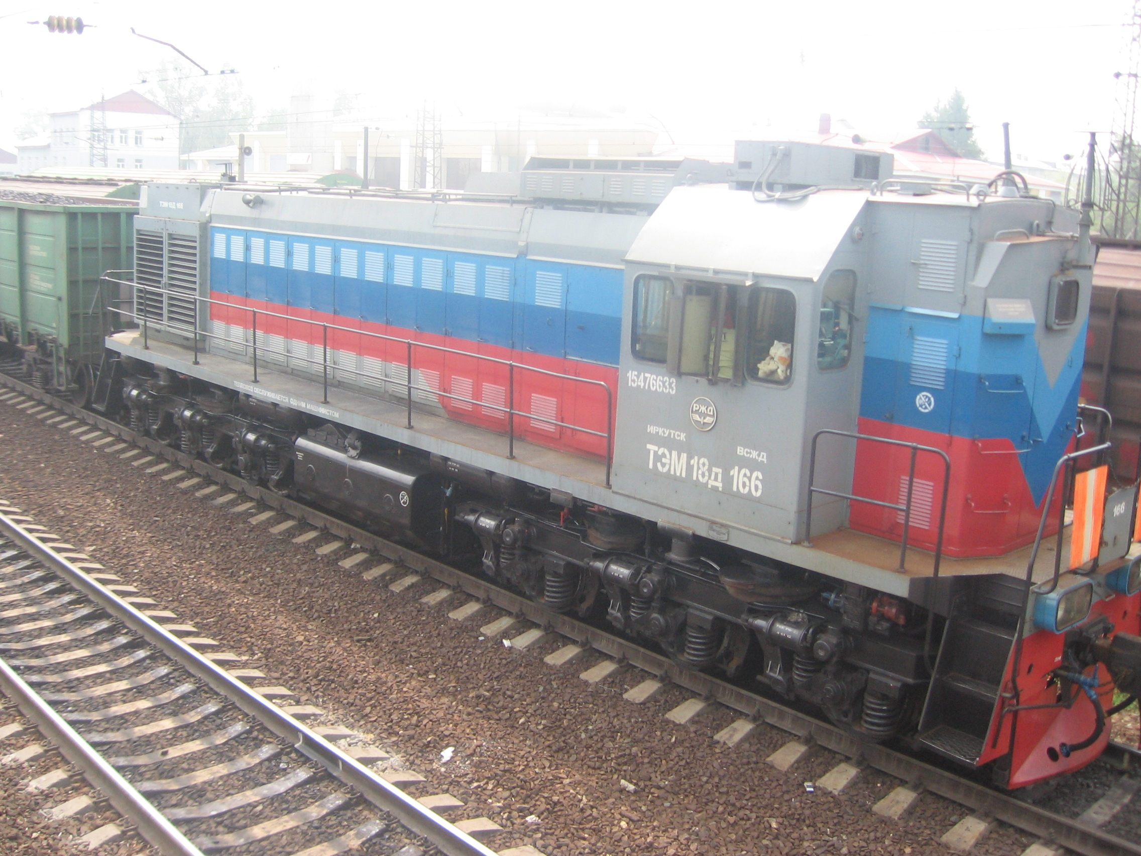 Иркутская область